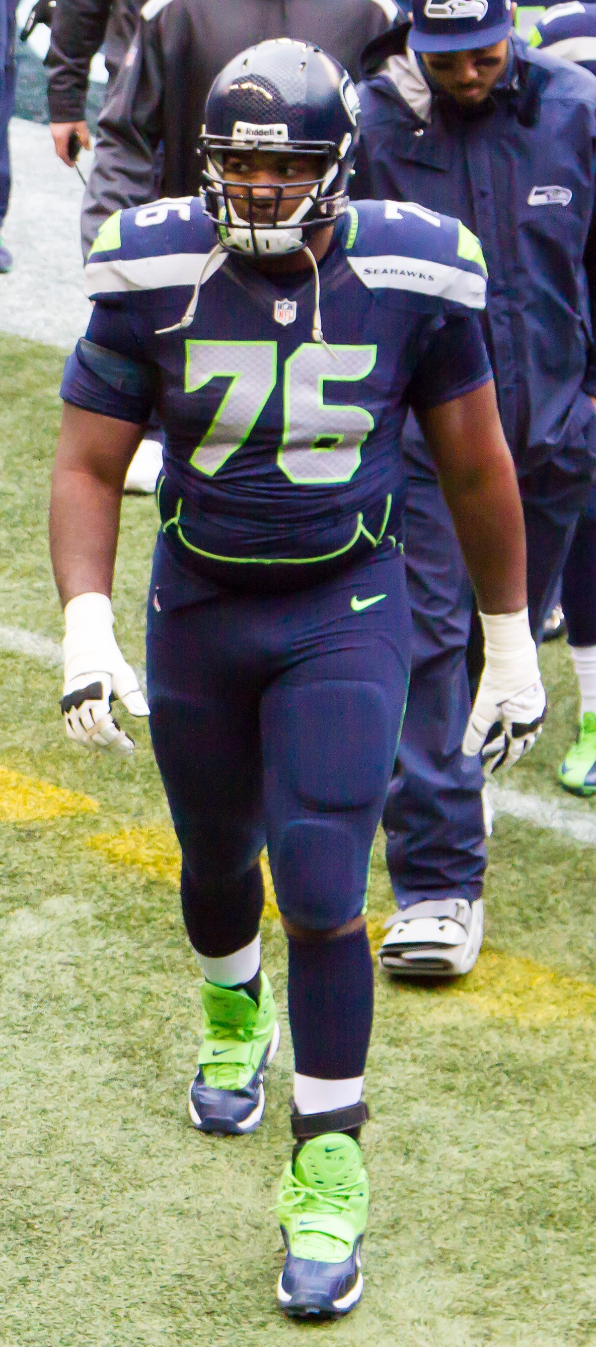 Russell Okung, Seahawks vs Rams 12.29.13